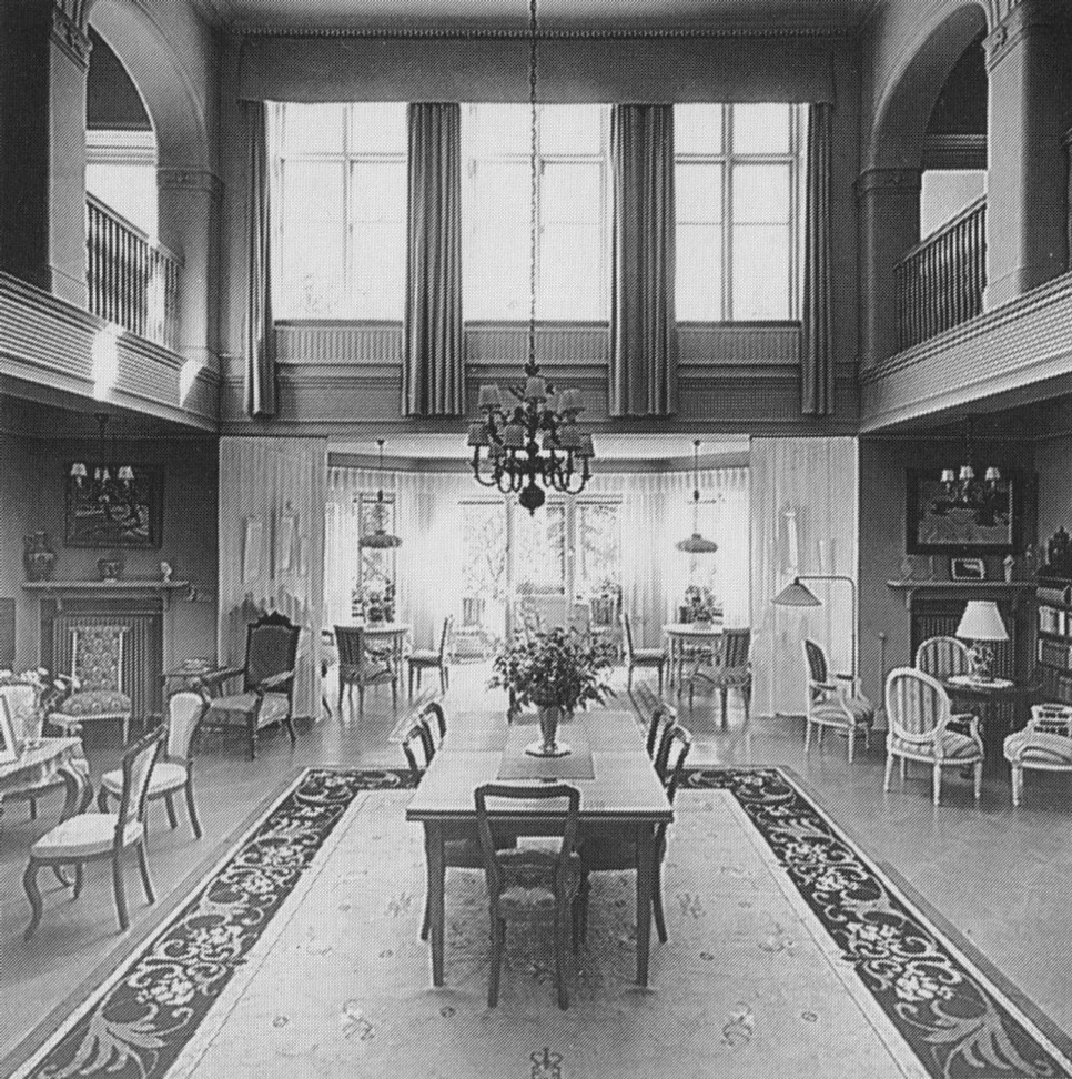 Solhemmet centralhallen